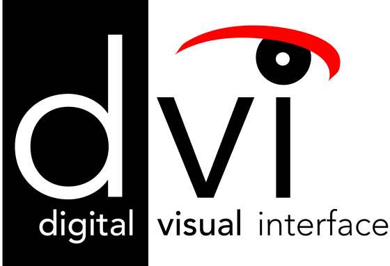 Logo DVI